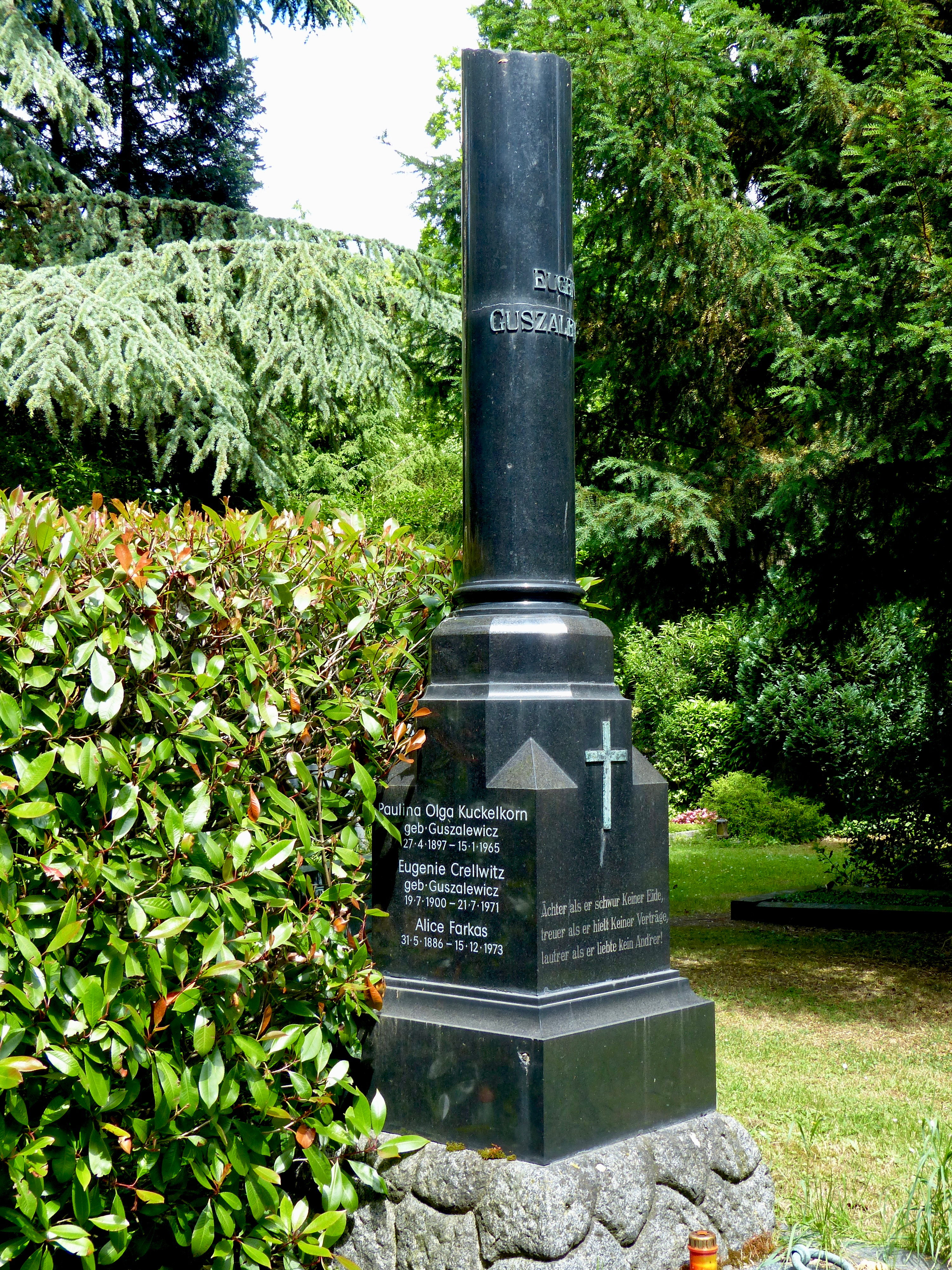 Familiengrab Eugen, Alice, Genia Guszalewicz und Paulina Olga Guszalewicz-Kuckelkorn; Flur 52